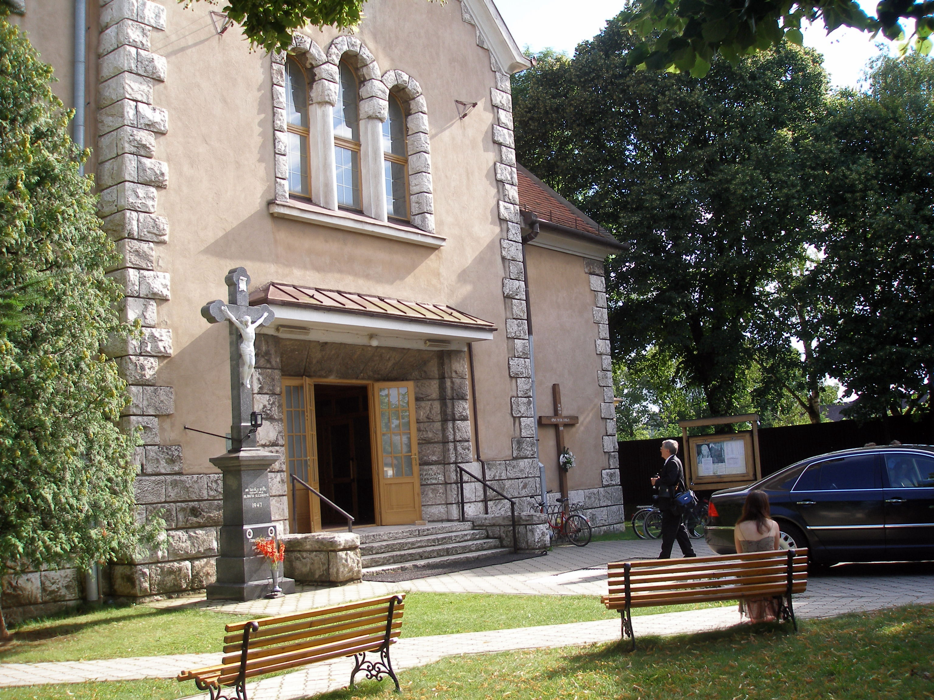 Kostol sv. Cyrila a Metoda v Košiciach časť Krásna